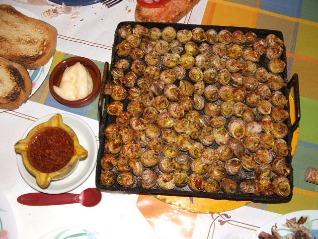 Caracoles a la Llauna dels Trulls Lleida Helix aspersa, determined 04 June 2011 by Francisco Welter-Schultes